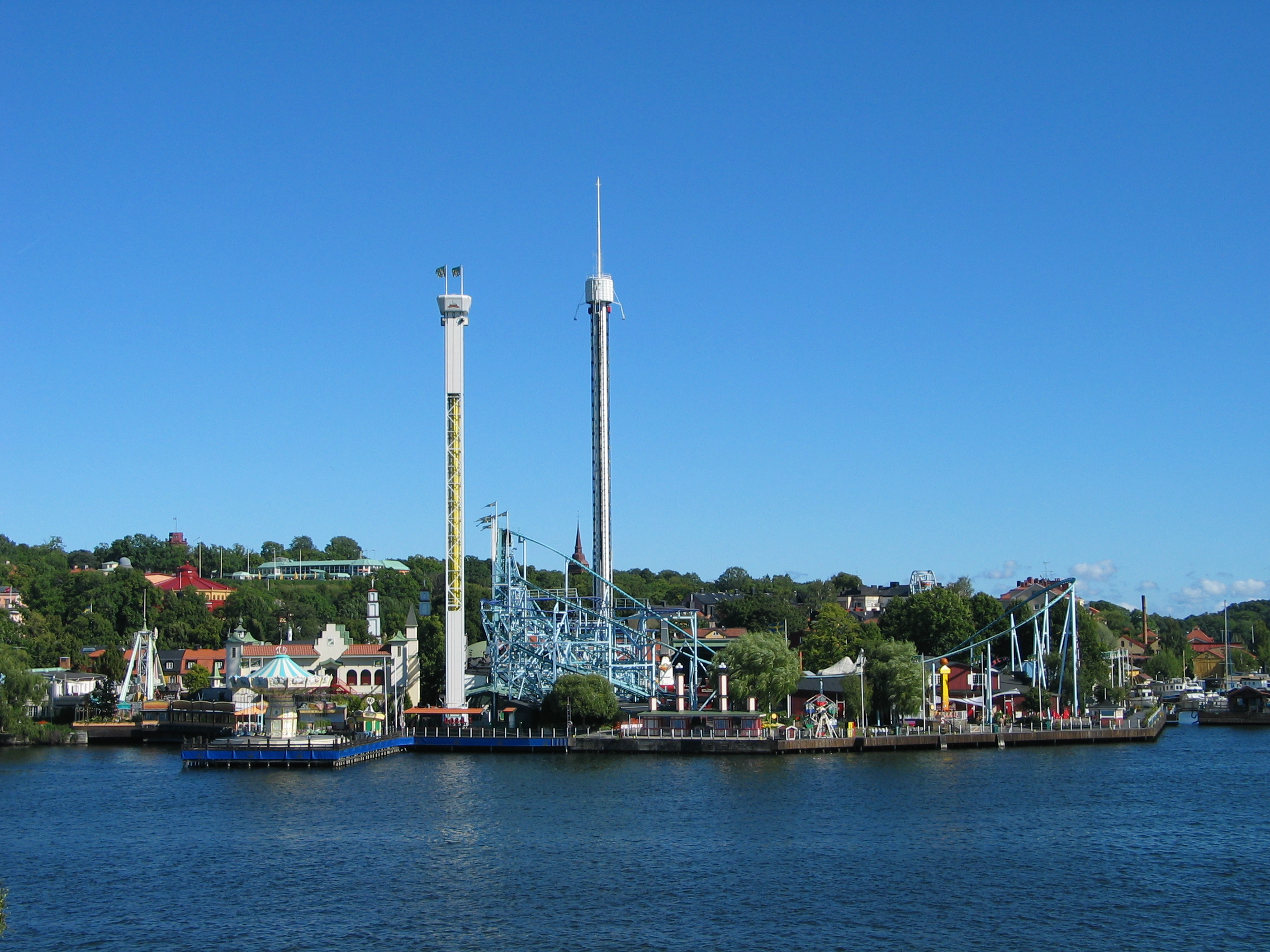 Gröna Lund, an amusement park in Stockholm, Sweden.